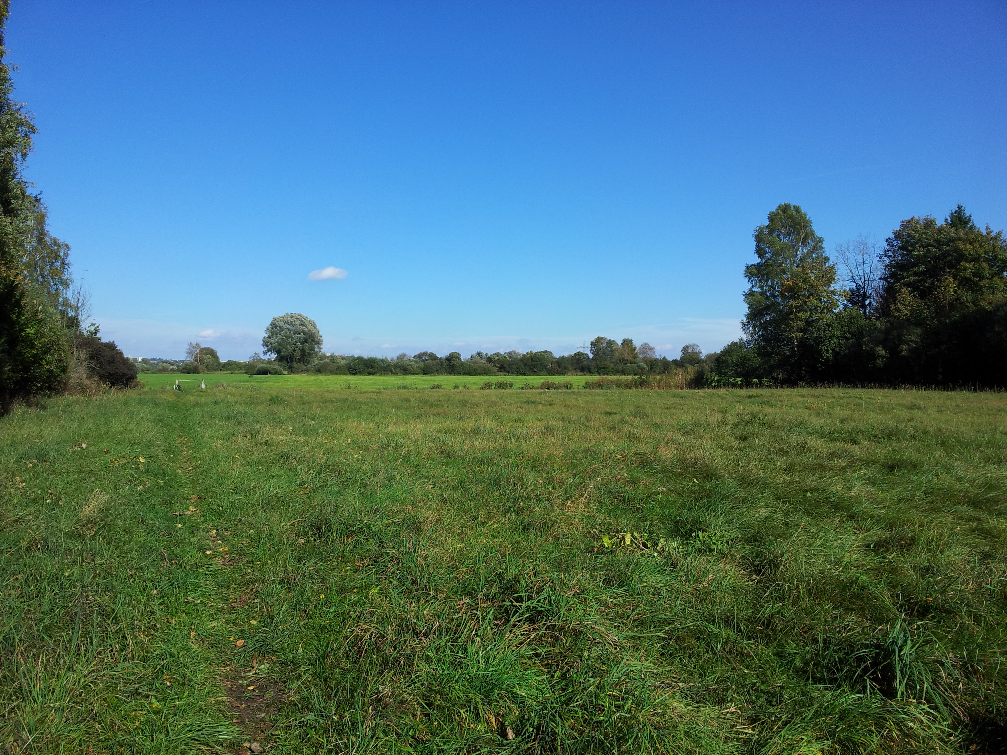 Freisinger Moos